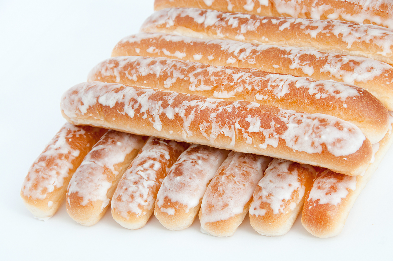 Fartons Polo, bollo valenciano perfecto para mojar en horchata.